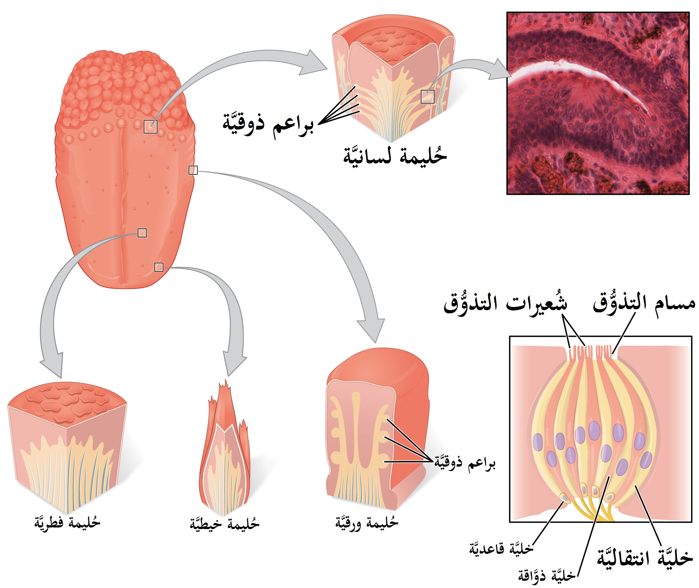 رسمٌ بياني يُوضح براعم التذوُّق الموجودة داخل حُليمات اللسان.